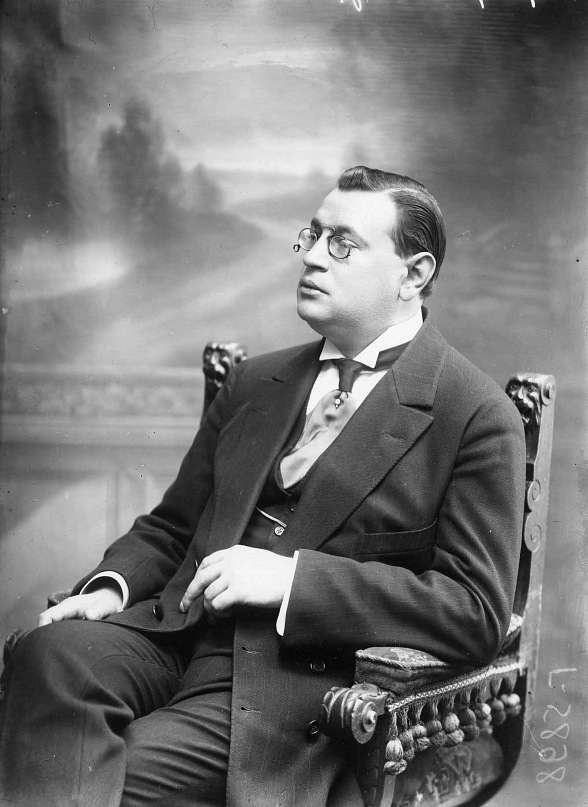 Аверченко, Аркадий Тимофеевич